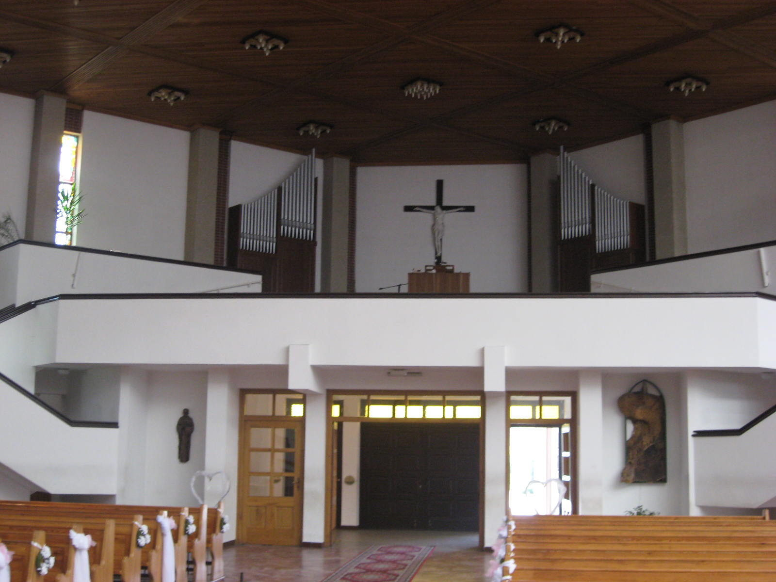 Organy 02